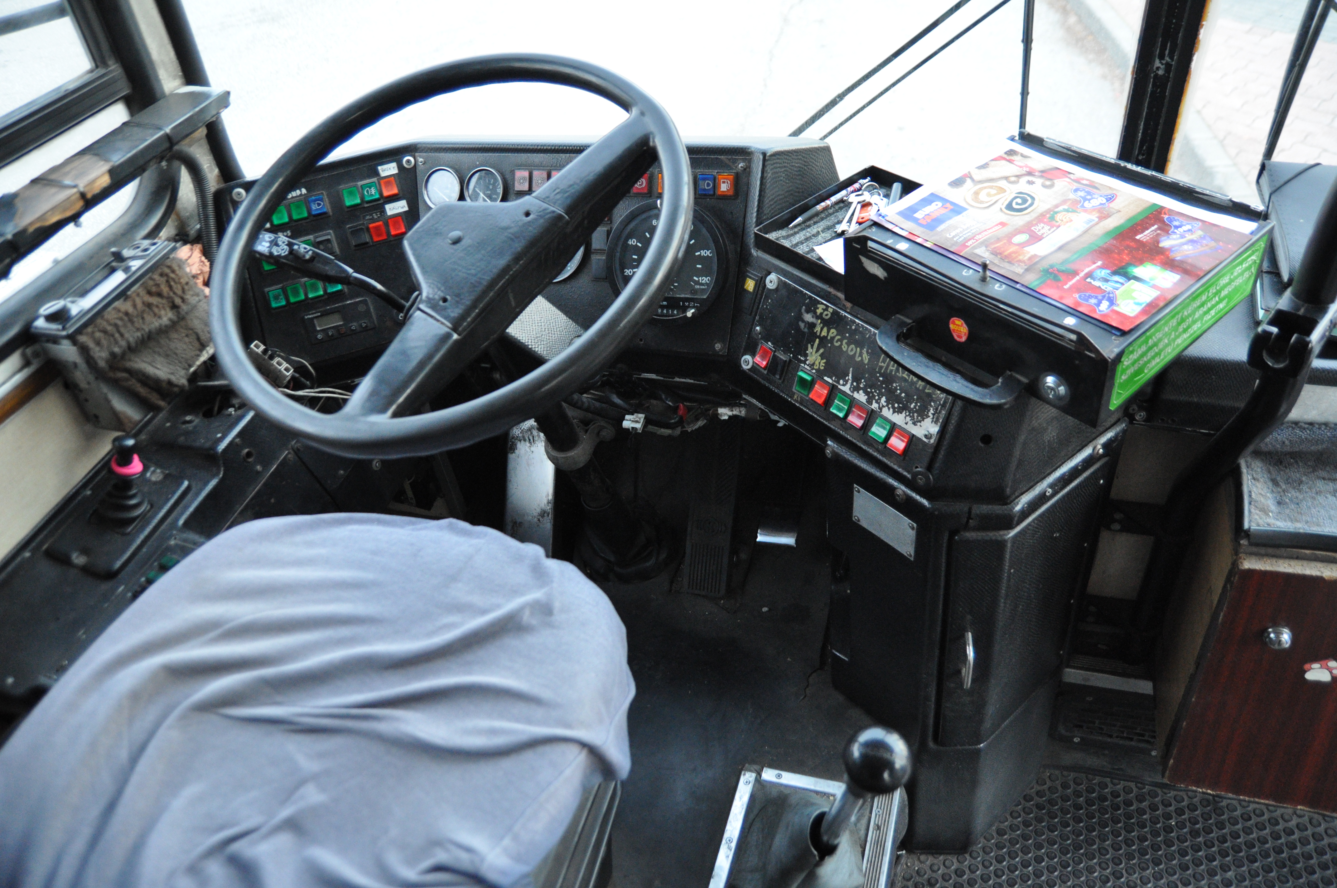 Ikarus 260, vezetőállás